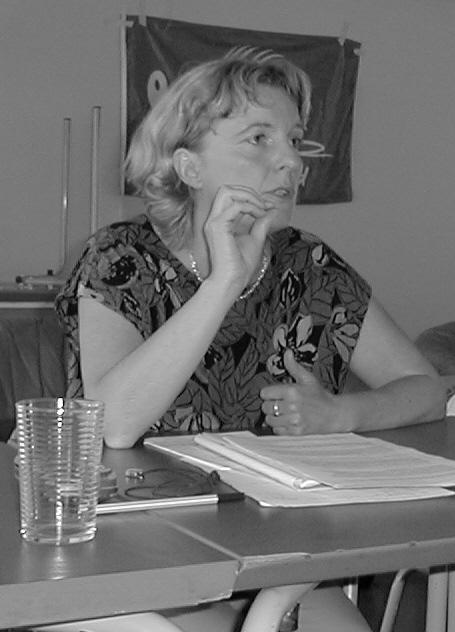 Christine Scheel, Politikerin von Bündnis 90/Die Grünen. Das Foto entstand auf einer Grünen-Veranstaltung in München.